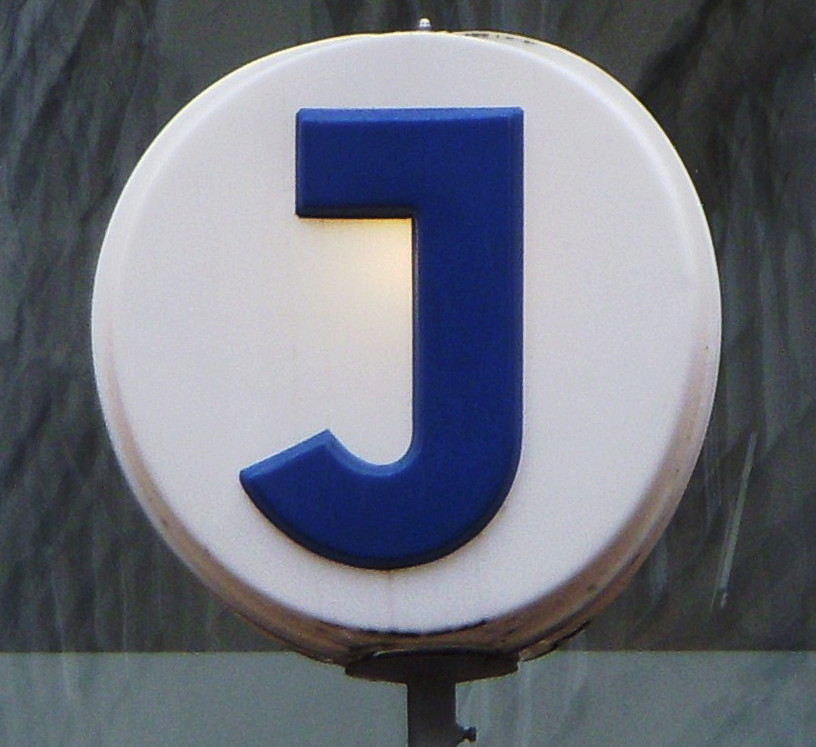 J-symbolen